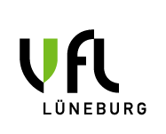 VfL Lüneburg Logo